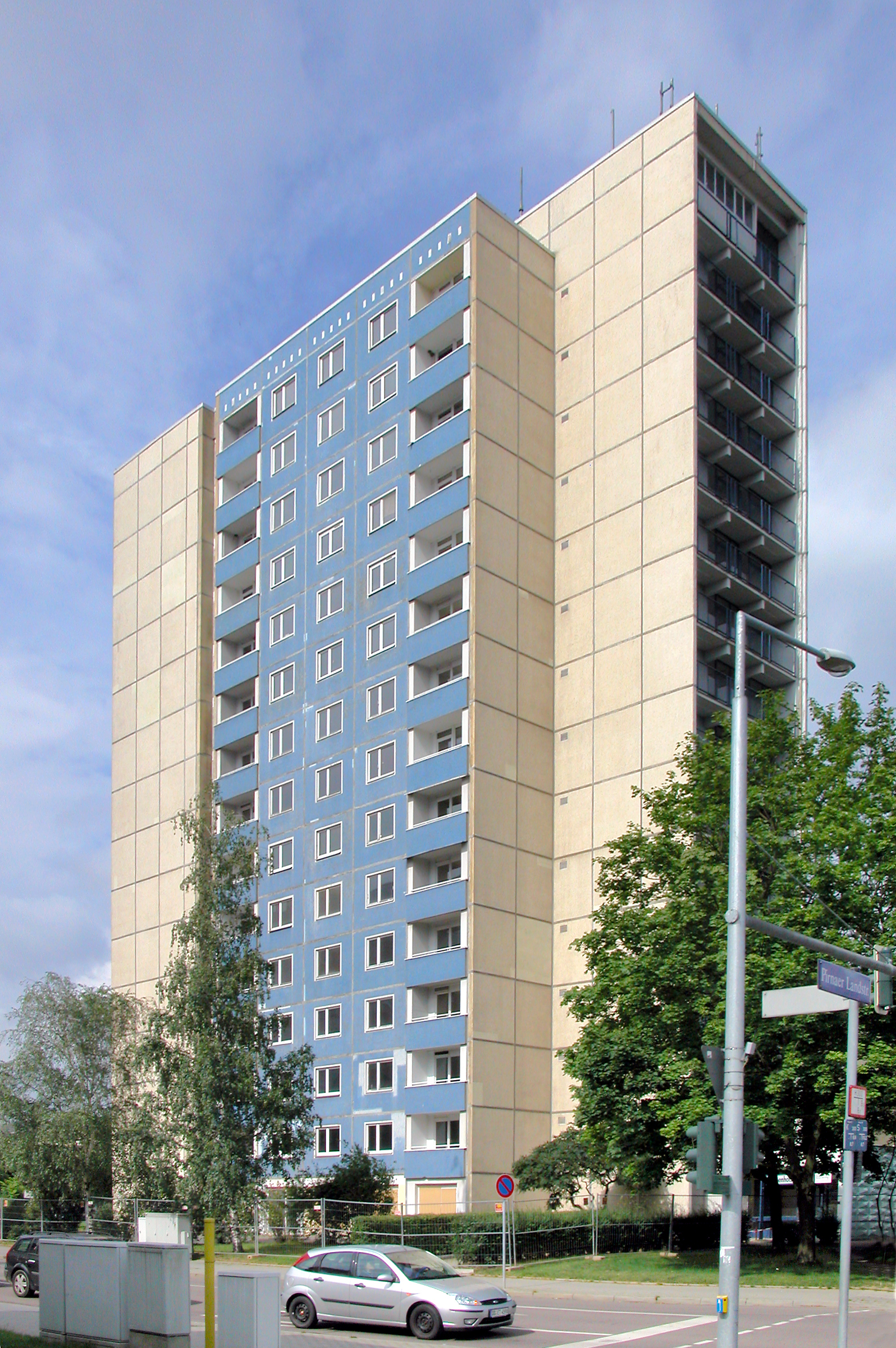 12.07.2009 01257 Dresden-Leuben: 14-gesch. Hochhaus (GMP: 51.012428,13.823080) Zamenhofstraße 2 / Ecke Rottwerndorfer Str. / Ecke Pirnaer Landstraße. Der Großvermieter Gagfah bereitet derzeit den Abriss des intakten DDR-Plattenbaus mit 87 Wohnungen vor. Im Herbst 2009 wird er verschwunden sein. Grundlage ist der Beschluß des Dresdner Stadtrates von 2002, bis zum Jahre 2010 siebentausend Wohnungen abzureißen. Die Bundesregierung beschloß 2001 das mit 2,5 Milliarden Euro dotierte Programm "Stadtumbau Ost", das den Abriß von 350 000 Wohnungen vorsah. Am 17. Juni 2009 hat der Bundestag - neben den 350 000 Wohnungen, deren Abriß bis 2009 geplant war - nochmals die Vernichtung weiterer 200 000 bis 250 000 Wohnungen beschlossen Für diese Abrisse waren 1,5 Milliarden Euro eingeplant. Das Ergebnis ist die Mietpreisexplosion. Sicht von Nordosten. [DSCN38177.TIF]20090712040DR.JPG(c)Blobelt